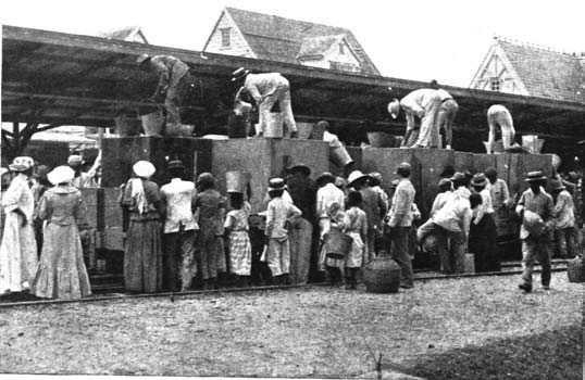 Waterverzorging van bewoners in Paramaribo gedurende de grote droogte van 1912. Het water kwam toen per trein uit Republiek, Para in Suriname.